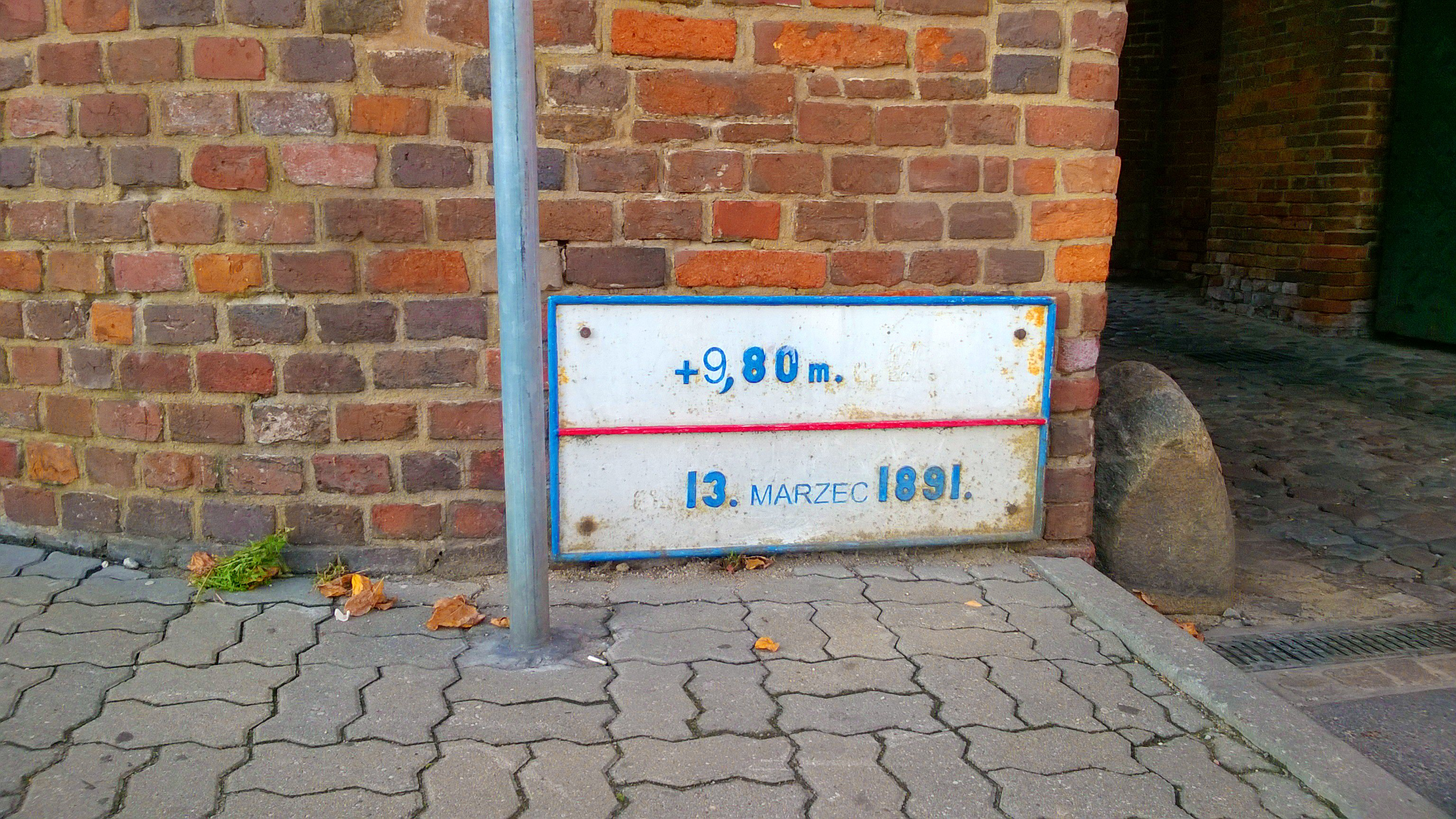 Tablica z historycznym stanem wód w Toruniu